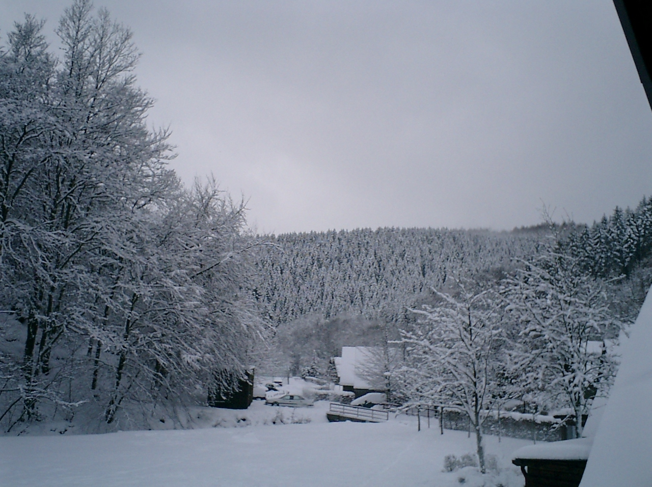 Val d'Arimont onder sneeuw